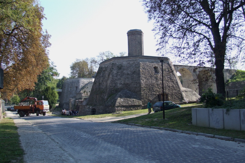 Museumsbark Rüdersdorf: Rumfordofen Fotograf: Harald Rossa Datum: 3. Oktober 2006 Höher aufgelöste Version ist verfügbar